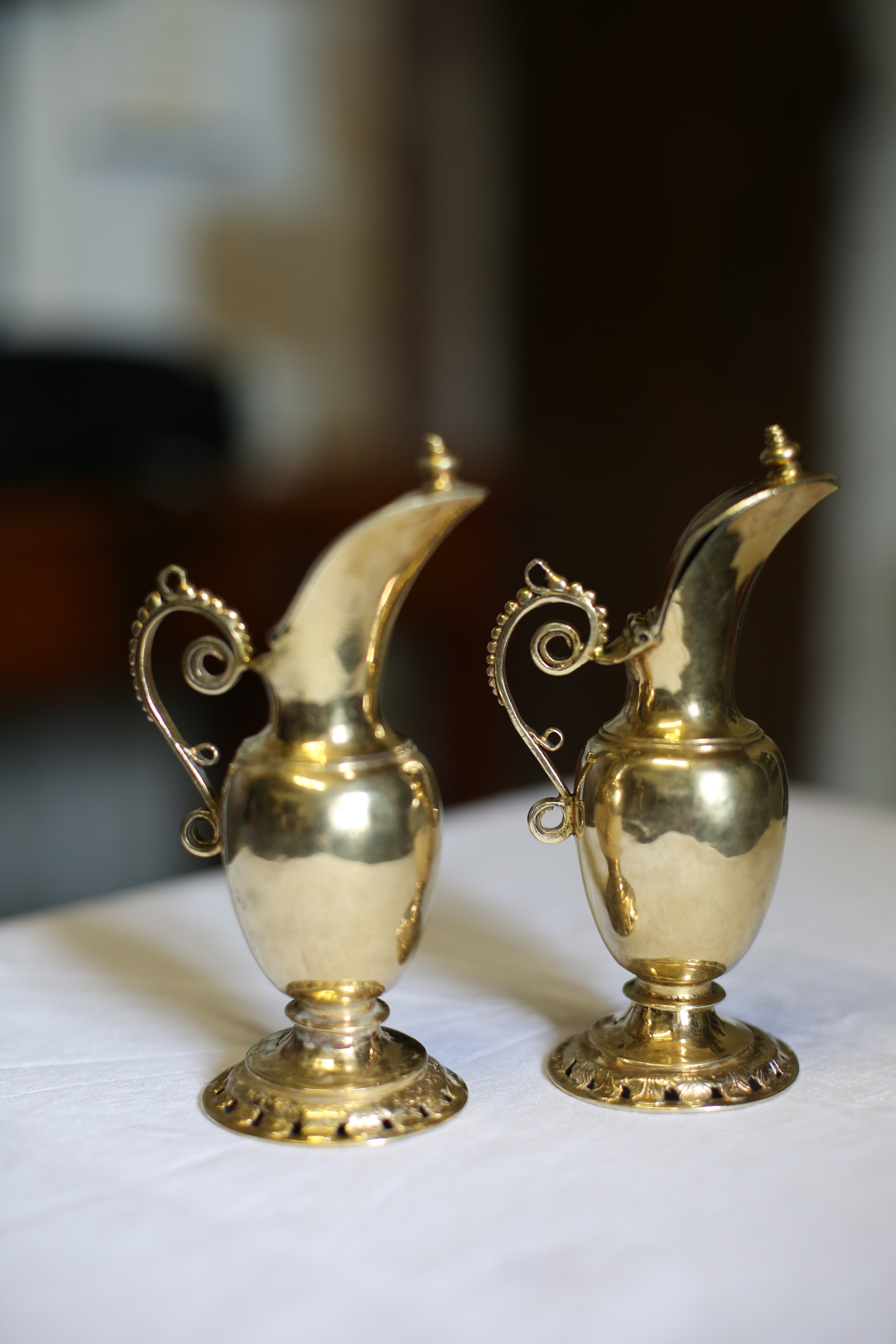 Paire de burettes -en argent vermeillé, conservées dans le trésor de Saint-Jean-du-Doigt.